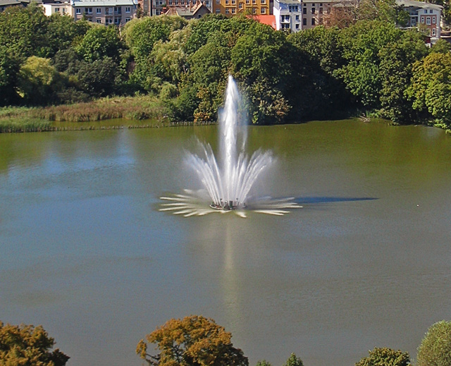 Springbrunnen des Knieperteichs / Stralsund